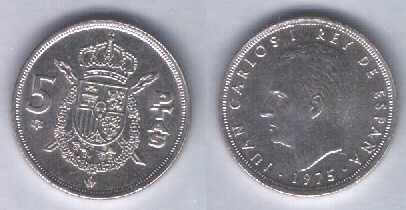 El escudo personal del monarca. 5 pesetas. No se aprecia la fecha en las estrellas. Ceca de Madrid